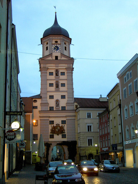 Vilshofen. Blick auf den Stadtturm.